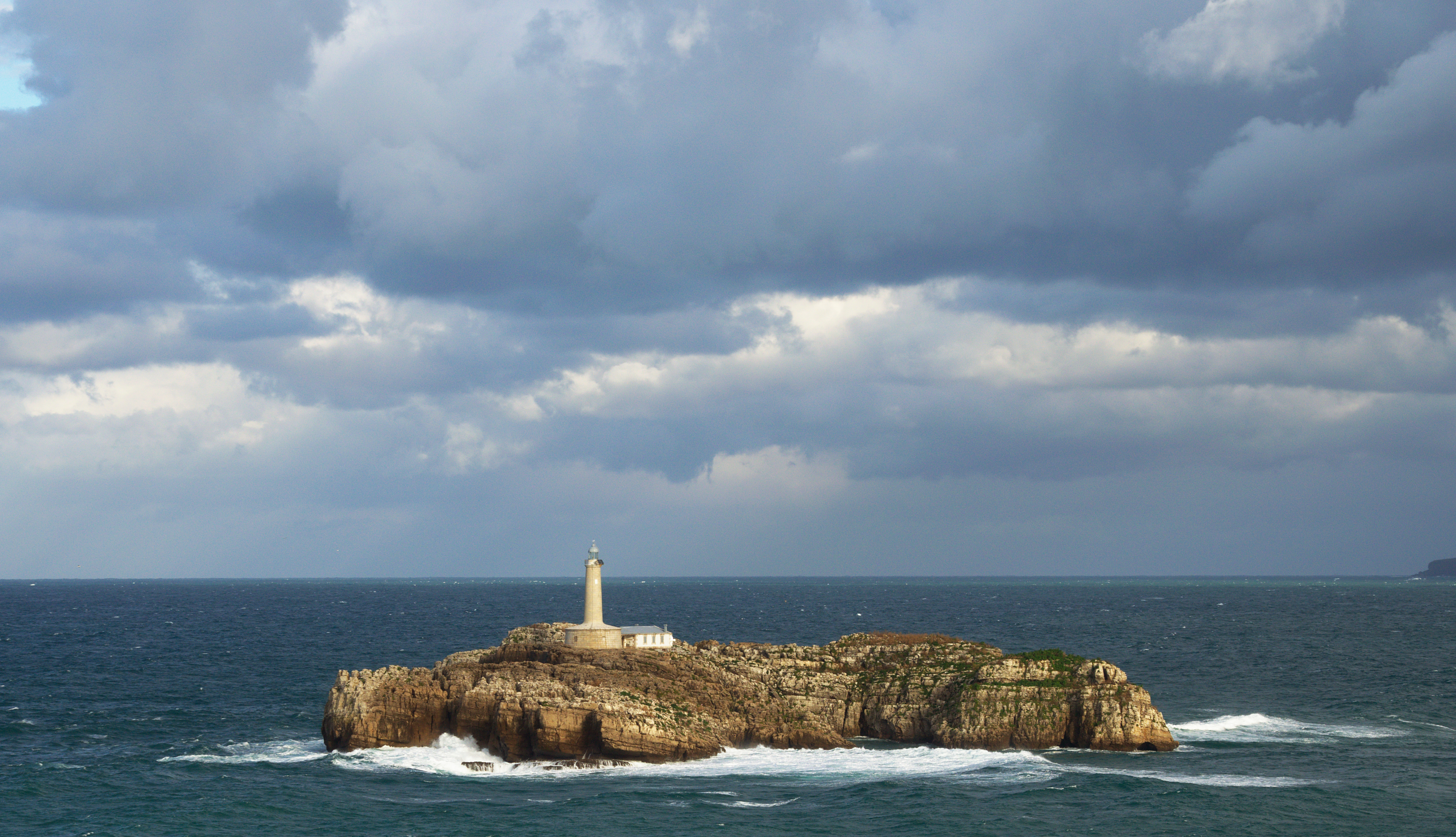 La isla de Mouro (originalmente denominada isla de Mogro) es una isla española situada frente a la península de la Magdalena, en la boca de la bahía de Santander, en Cantabria. Destaca mucho en el paisaje, si bien su territorio es sólo de 1,7 hectáreas. Enteramente rocosa y bastante llana, posee un faro en una de sus partes más altas. Es muy conocida por los buceadores por los ricos fondos que hay a su alrededor.